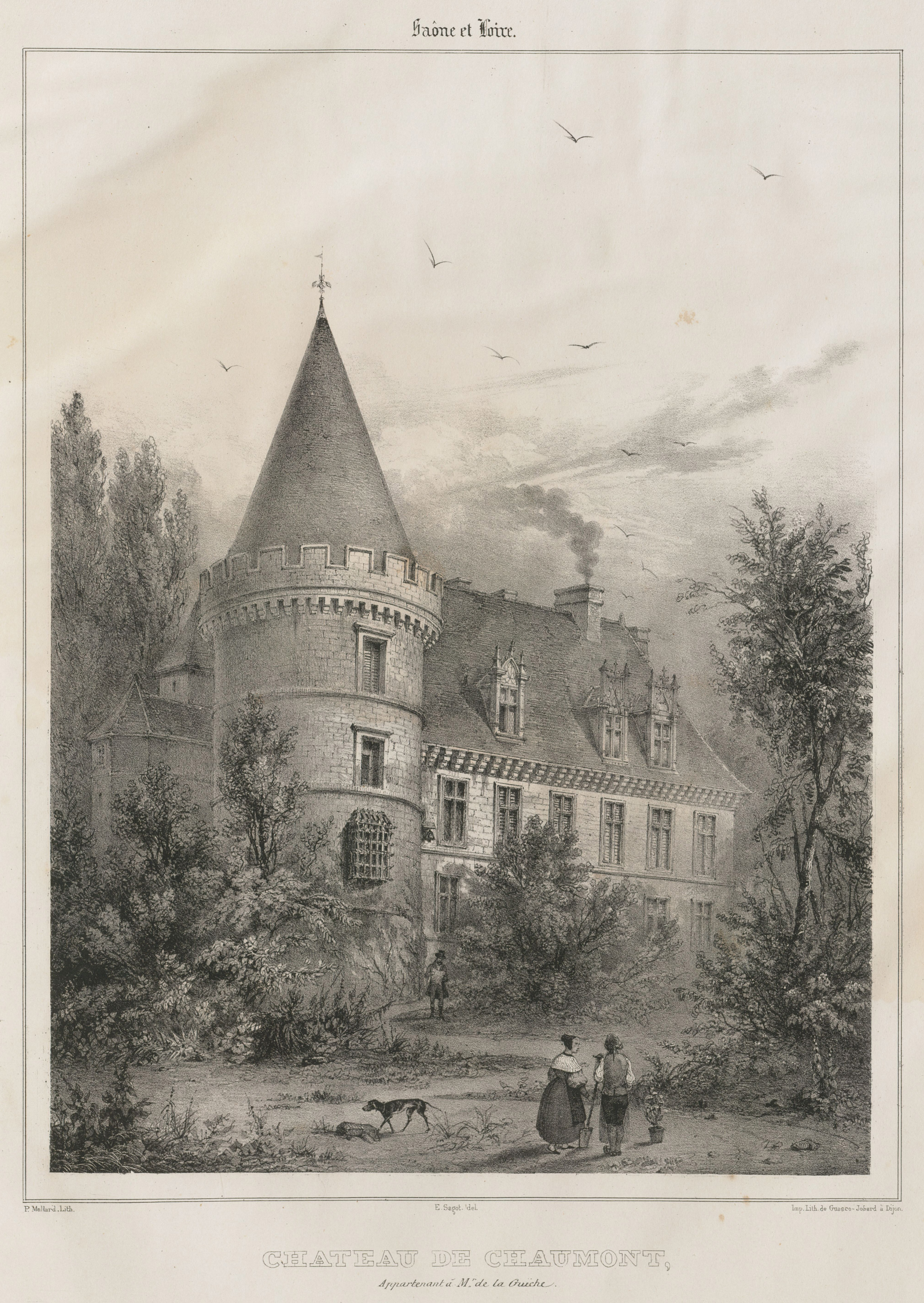 Château de Chaumont, Saône-et-Loire. Dessin issu de Voyage pittoresque en Bourgogne ou Description historique et vues des monuments antiques, modernes et du Moyen âge.... Partie 2, sous la direction de Charles-Hippolyte Maillard de Chambure, Gabriel Peignot et Boudot Éditeur : impr. Vve Brugnot 1835 dessin E. Sagot